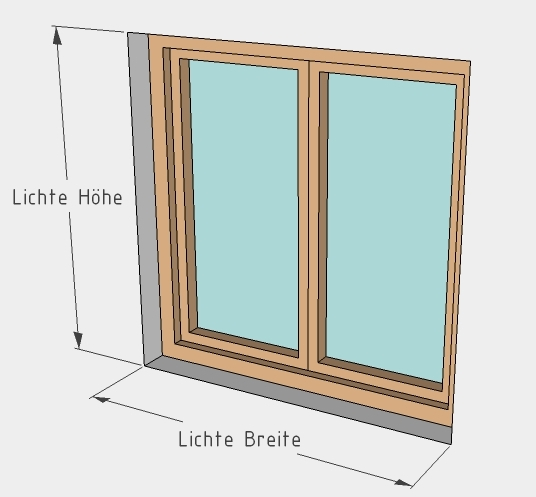 Fensterlichte